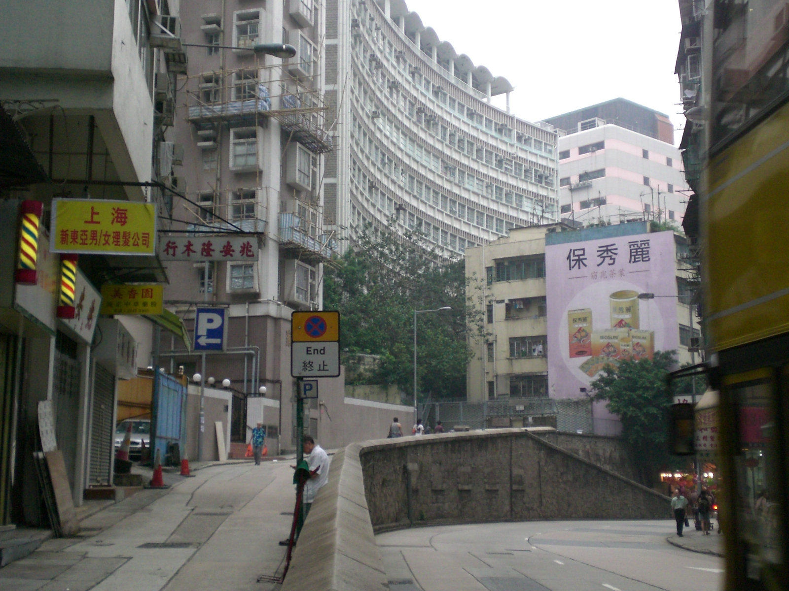 前稱 西營盤醫院，1874年創立，俗稱 國家醫院，現稱 西營盤賽馬會分科診所，位於皇后大道西130號，是香港第一所政府公立醫院。